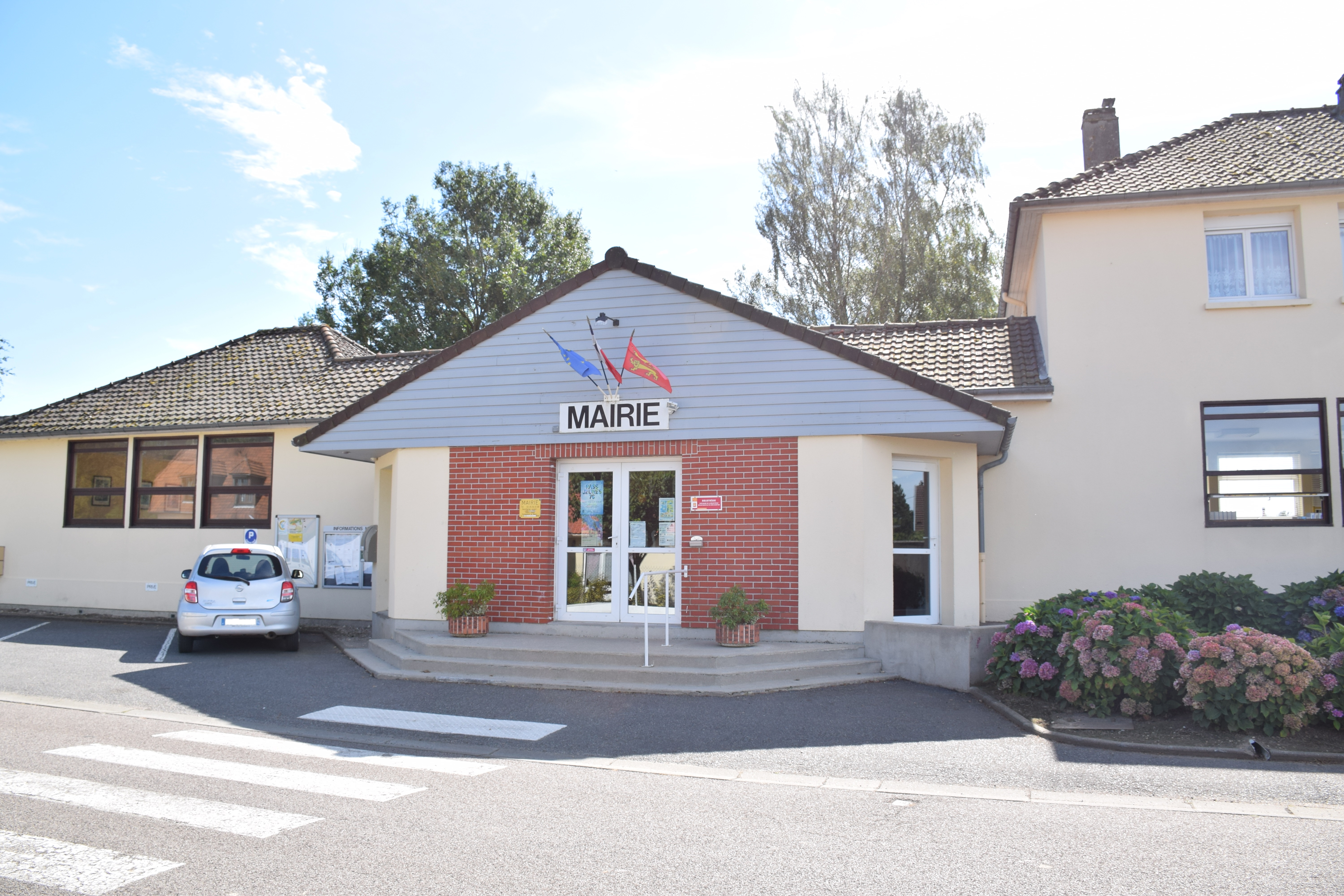 Mairie